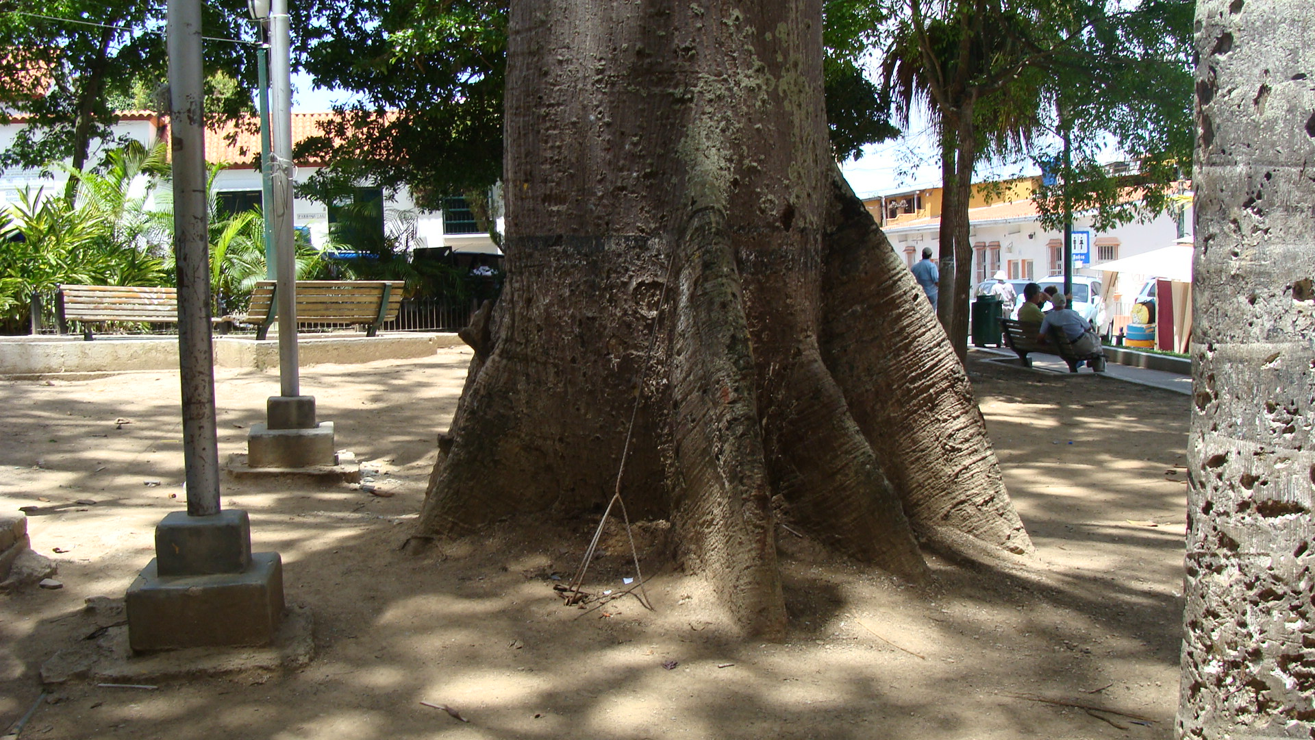 Contrafuertes en la base del tronco de una ceiba en la plaza Bolívar de El Hatillo, Venezuela